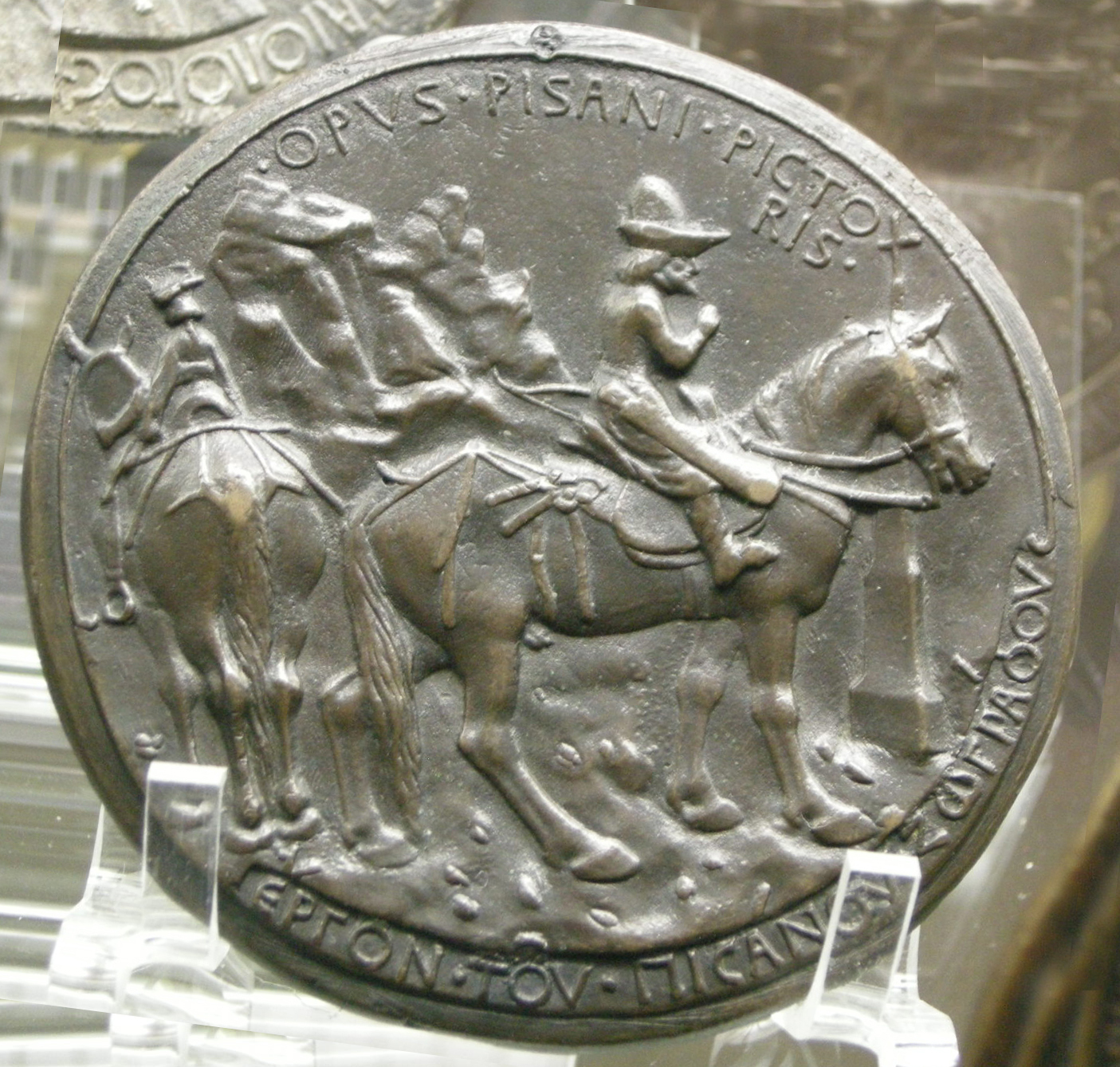 CdM, pisanello, medaglia di giovanni VIII paleologo v